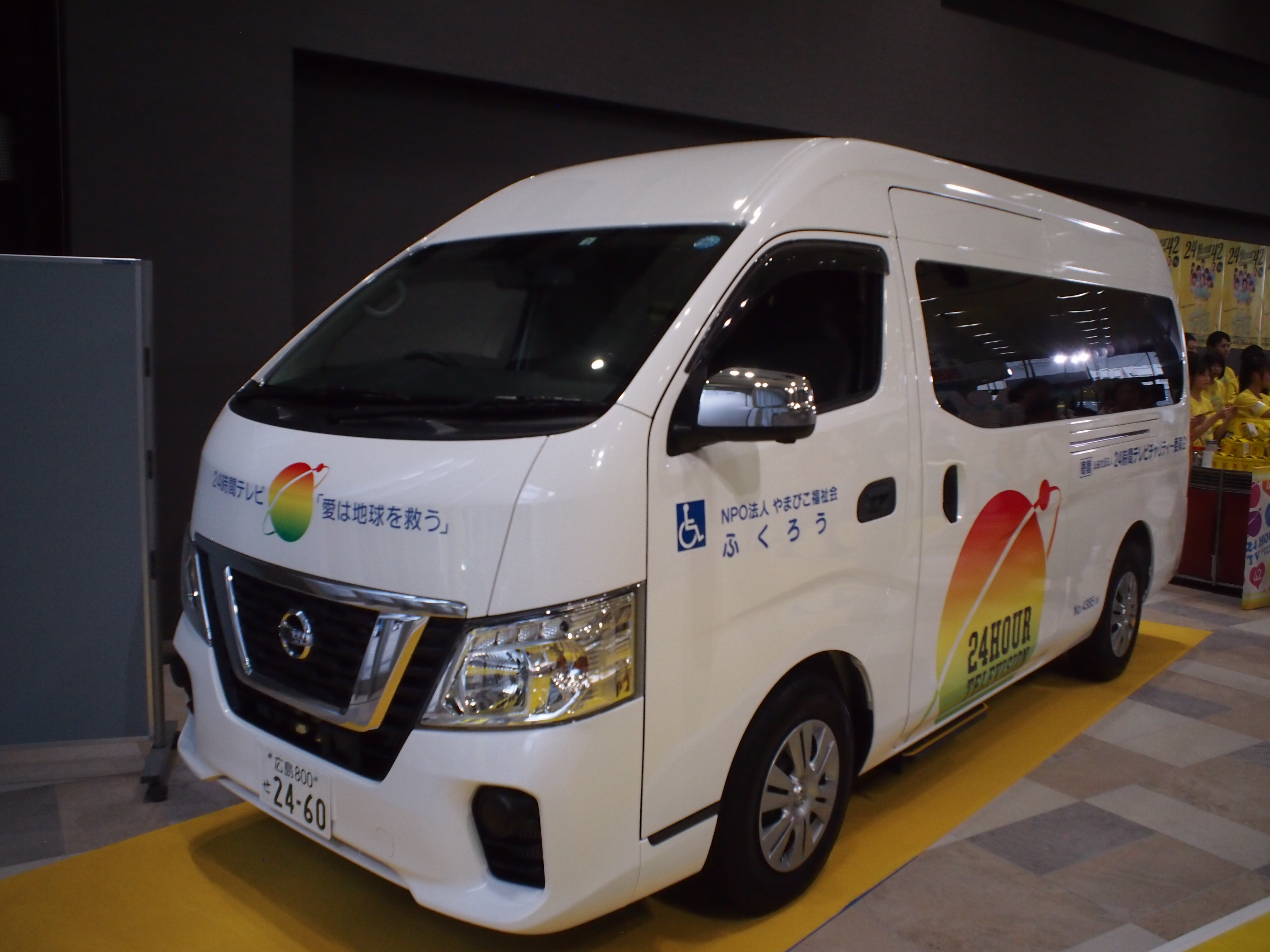 福祉車両（ja:24時間テレビ 「愛は地球を救う」）